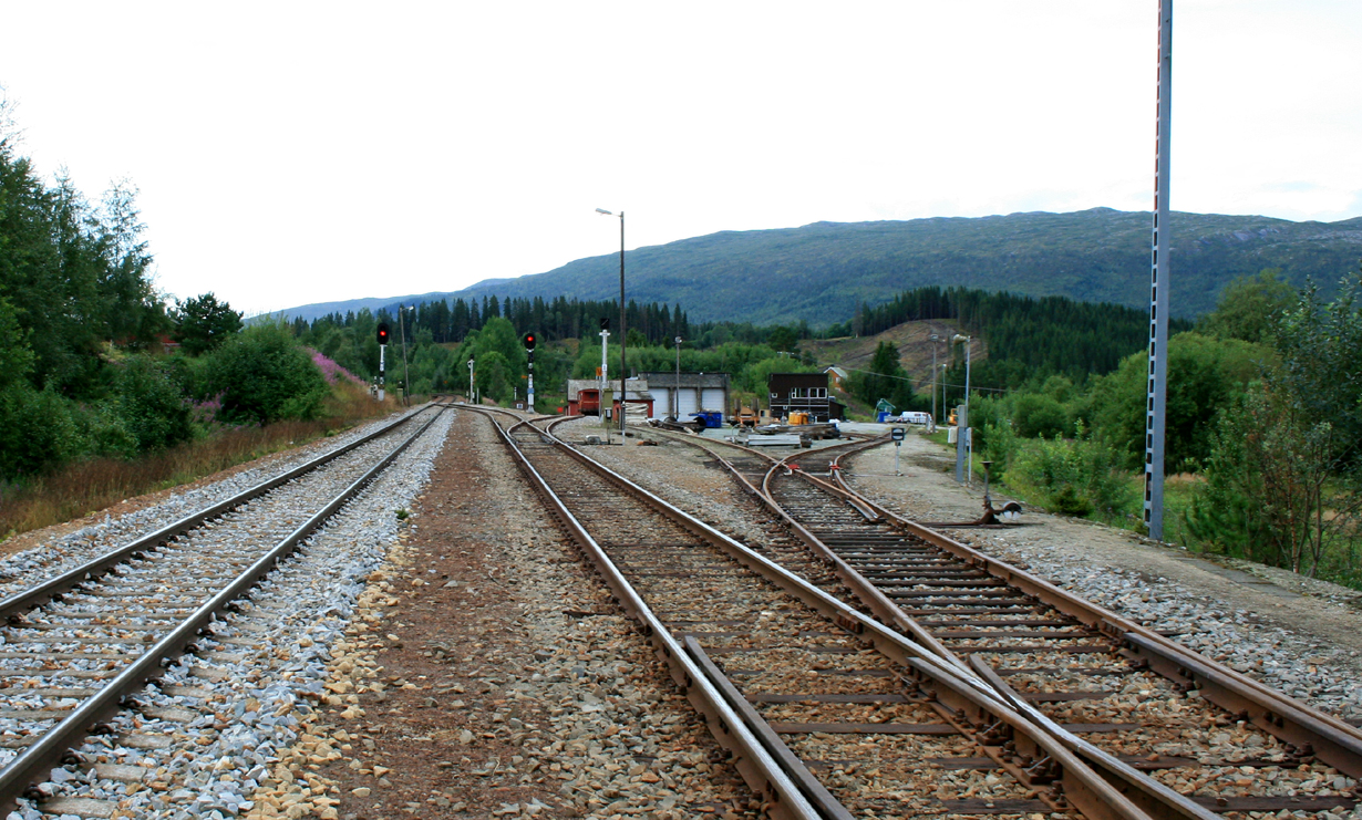 Namsosbanens begynnelse ved Grong. Nordlandsbanen til venstre.